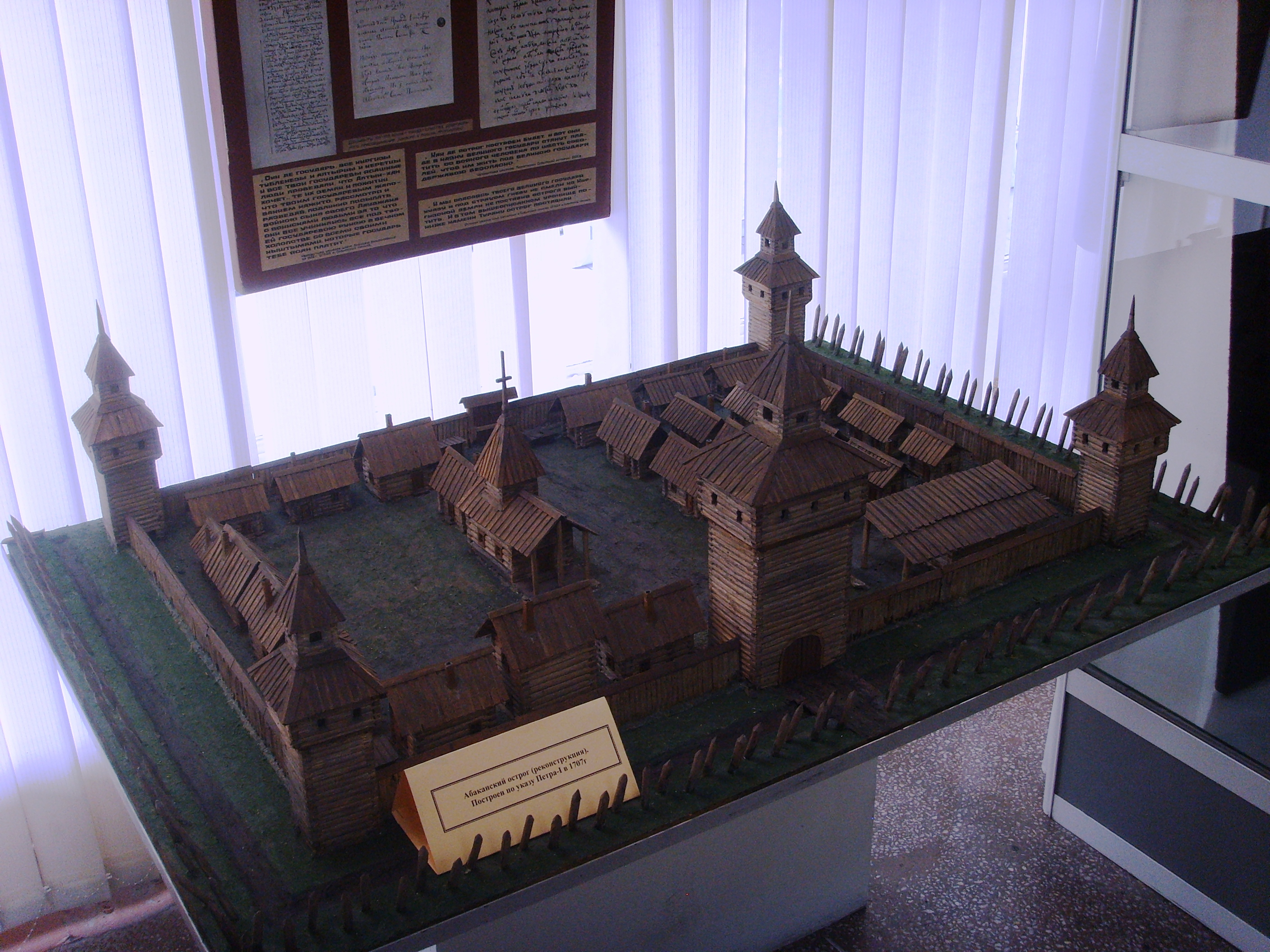 Макет установлен в экспозиции Хакасского музея